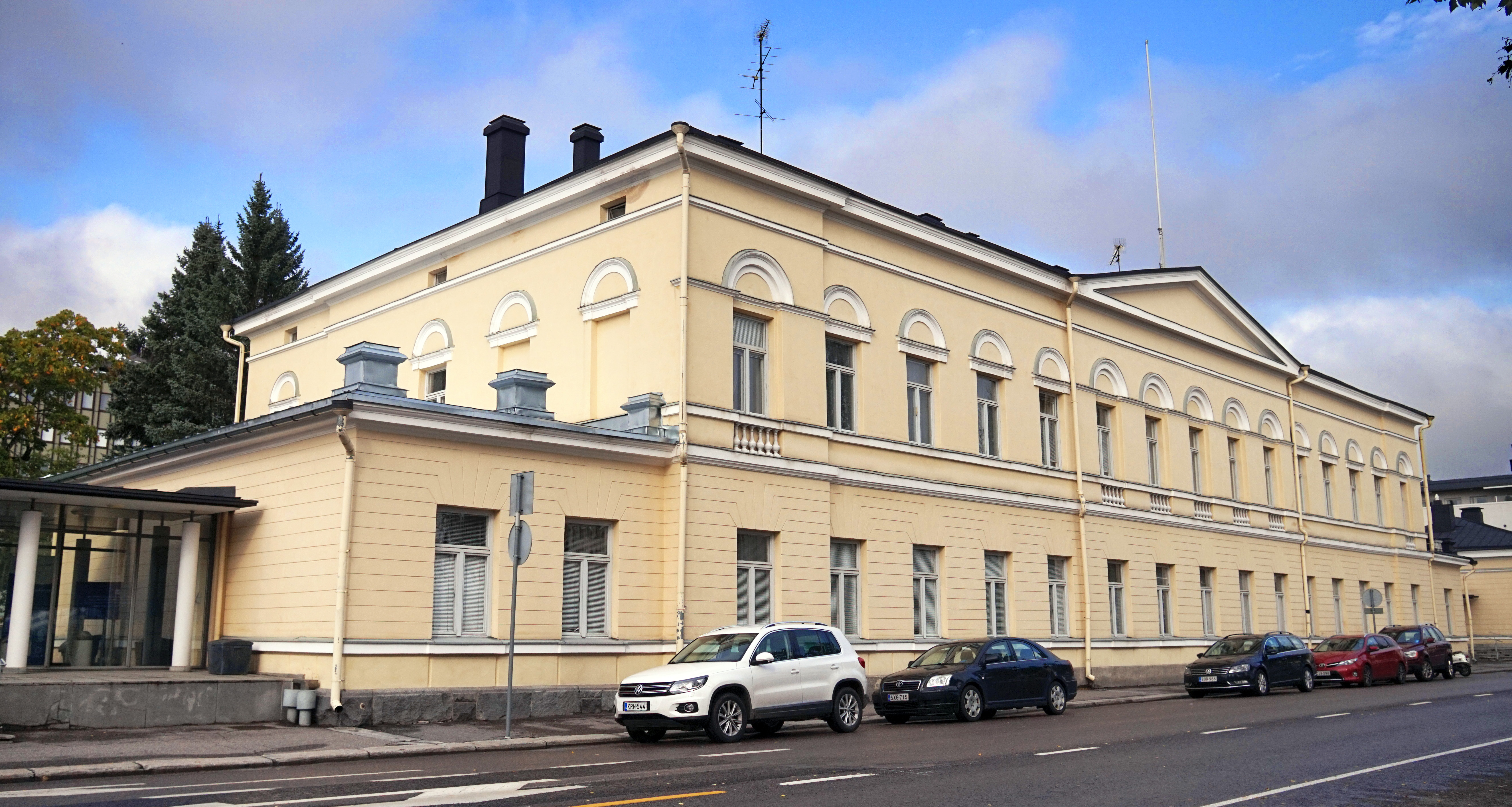 Mikkelin Lääninhaliltus.